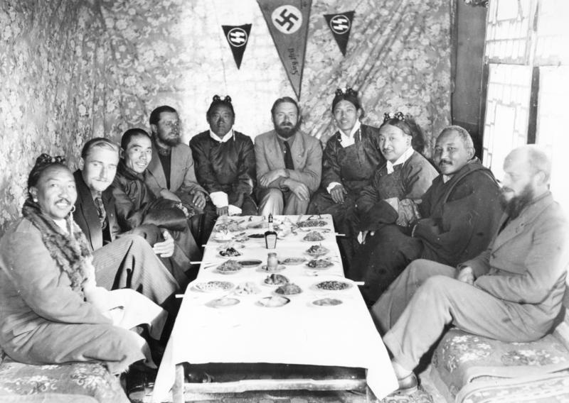 Tibetexpedition, Empfang für Würdenträger Lhasa, Expedition beim Empfang tibetischer Würdenträger [unter Anderen Links: Beger, Geer ; Kopfende: Tsarong Dzasa, Schäfer; Rechts: Wienert, Möndro (Möndo) Essen] Abgebildete Personen: Schäfer, Ernst Dr.: SS-Sturmbannführer, Leiter des Sven-Hedin-Institutes, Deutschland (GND 123991420) Beger, Bruno Dr.: SS-Hauptsturmführer, Abteilungsleiter Sven-Hedin-Institut, Deutschland (GND 128720654)